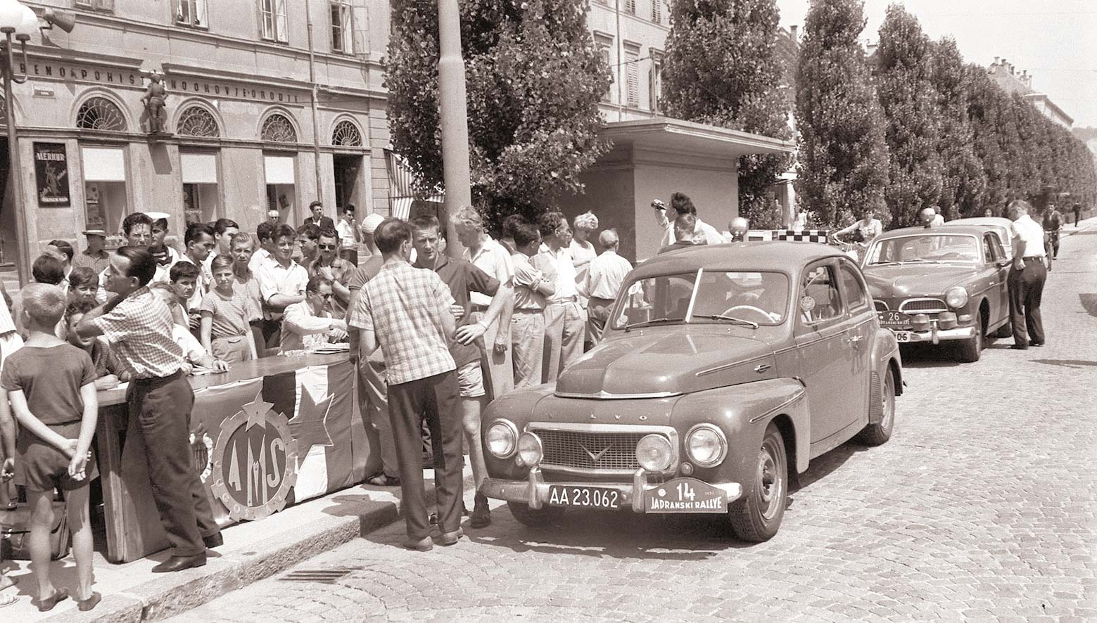 VIII. Jadranski rally v Mariboru.